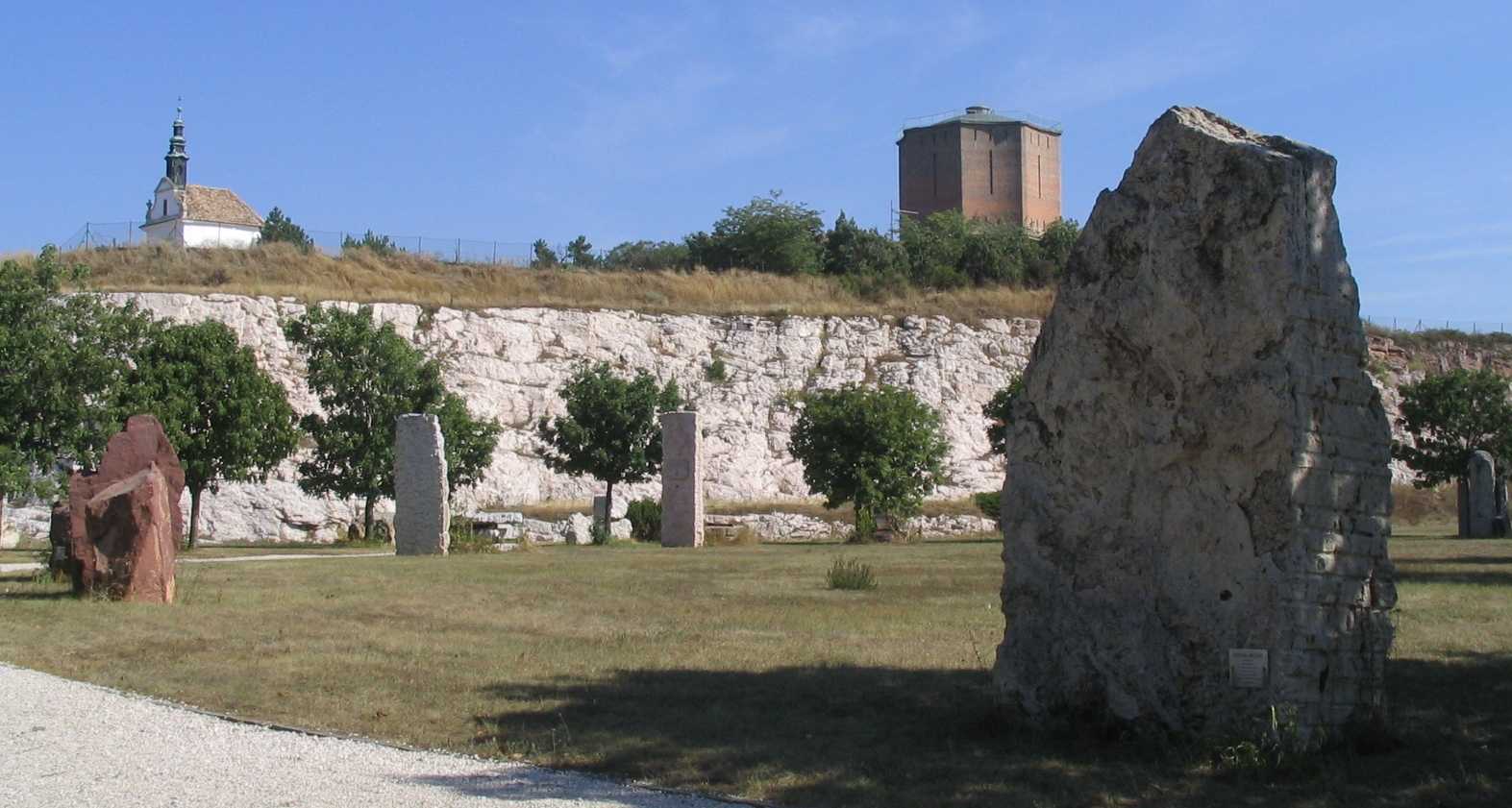 Kálváriadomb, Geológiai Múzeum, Tata